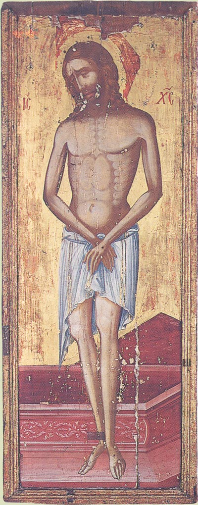 Akra Tapeinosis. Cyprus/ Христос во гробе. Кипр. Музей Свято-Киккского монастыря.